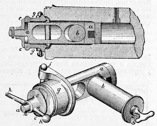 Данное изображение было использовано в статье «Варендорф» опубликованной в пятом томе «Военной энциклопедии», который был издан книгоиздательским товариществом Ивана Дмитриевича Сытина в 1911 году в столице Российской империи городе Санкт-Петербурге.